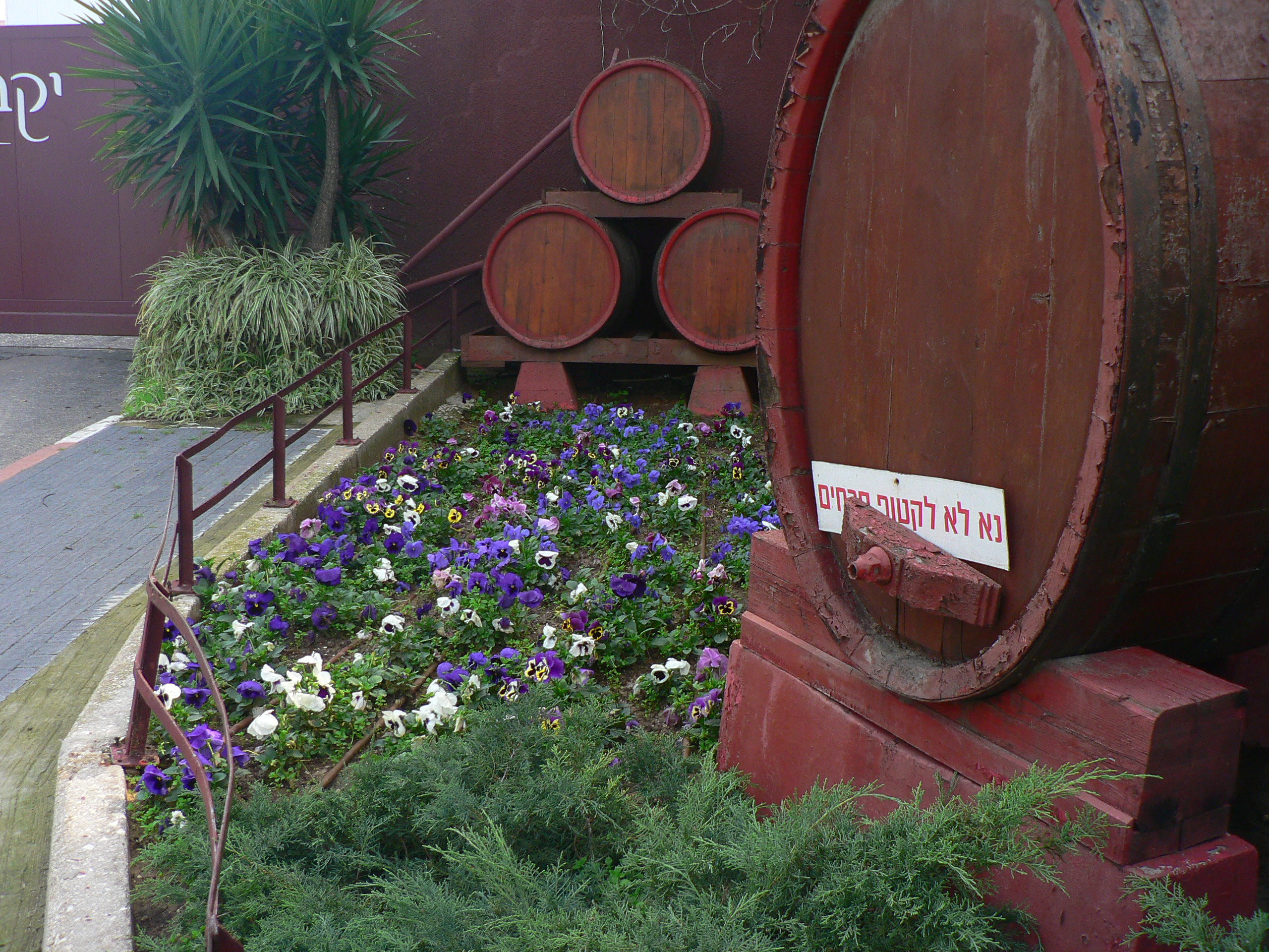 The Yekev (Winery) of "Yikvey Carmel" in Rishon LeZion, Israel שער הכניסה ליקב בראשון לציון, יקבי כרמל